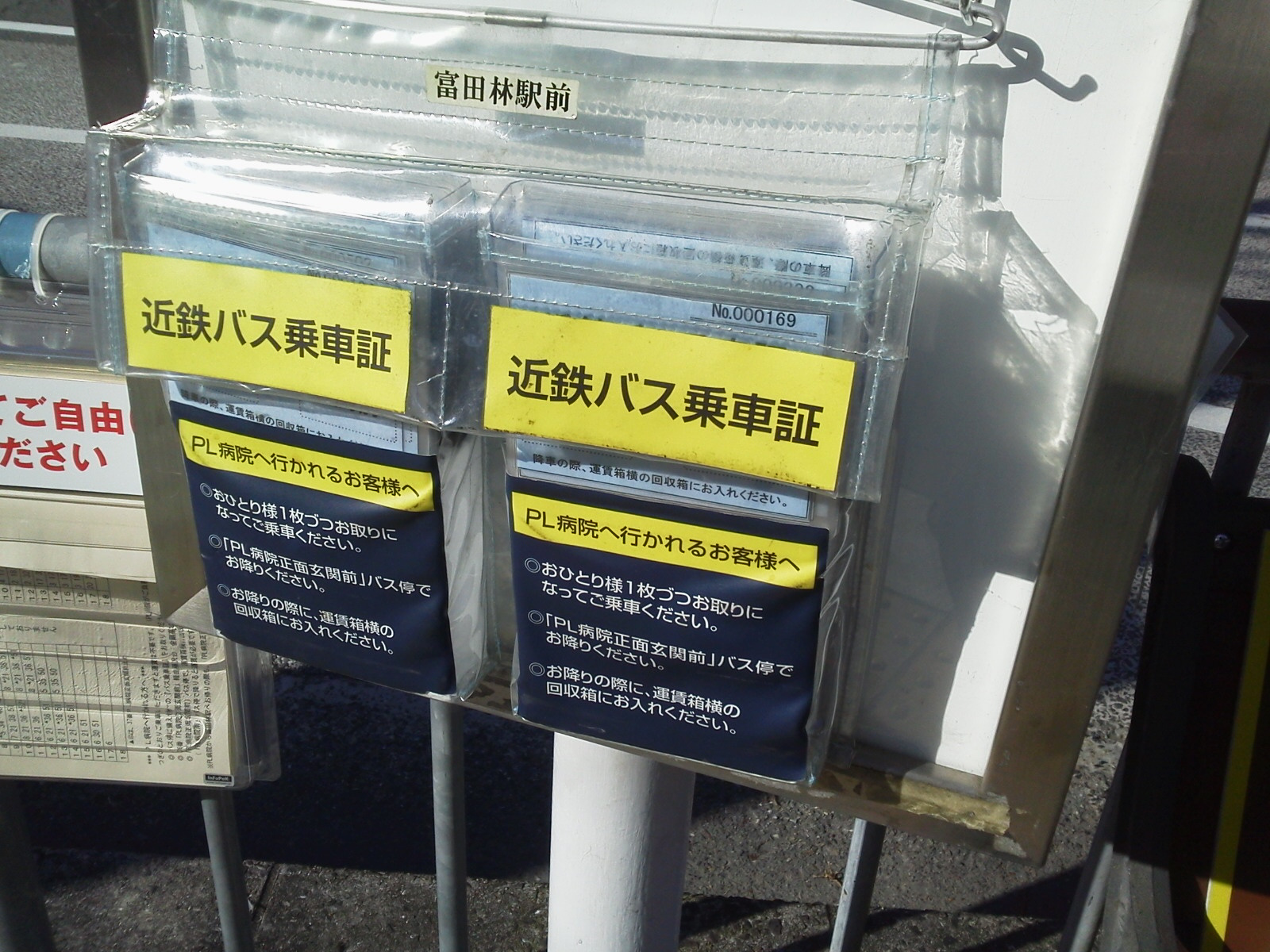 Tondabayashi pl